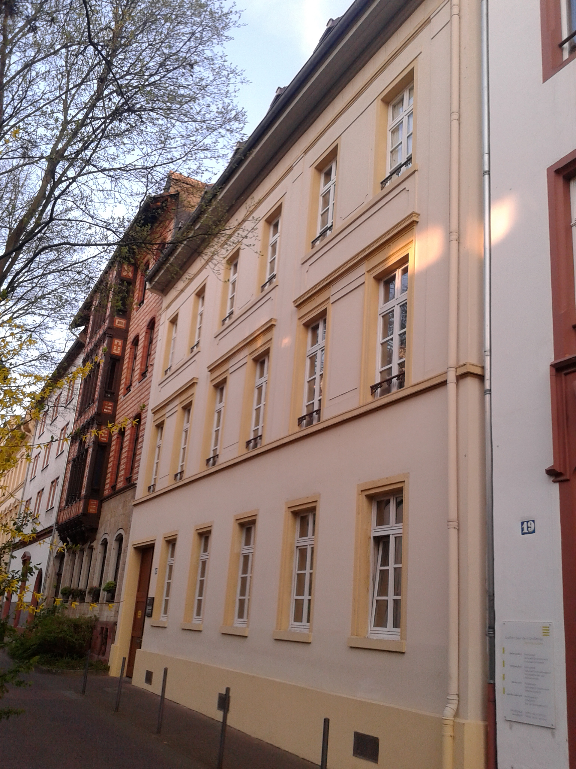 Baudenkmal Walpodenstraße 17 Mainz